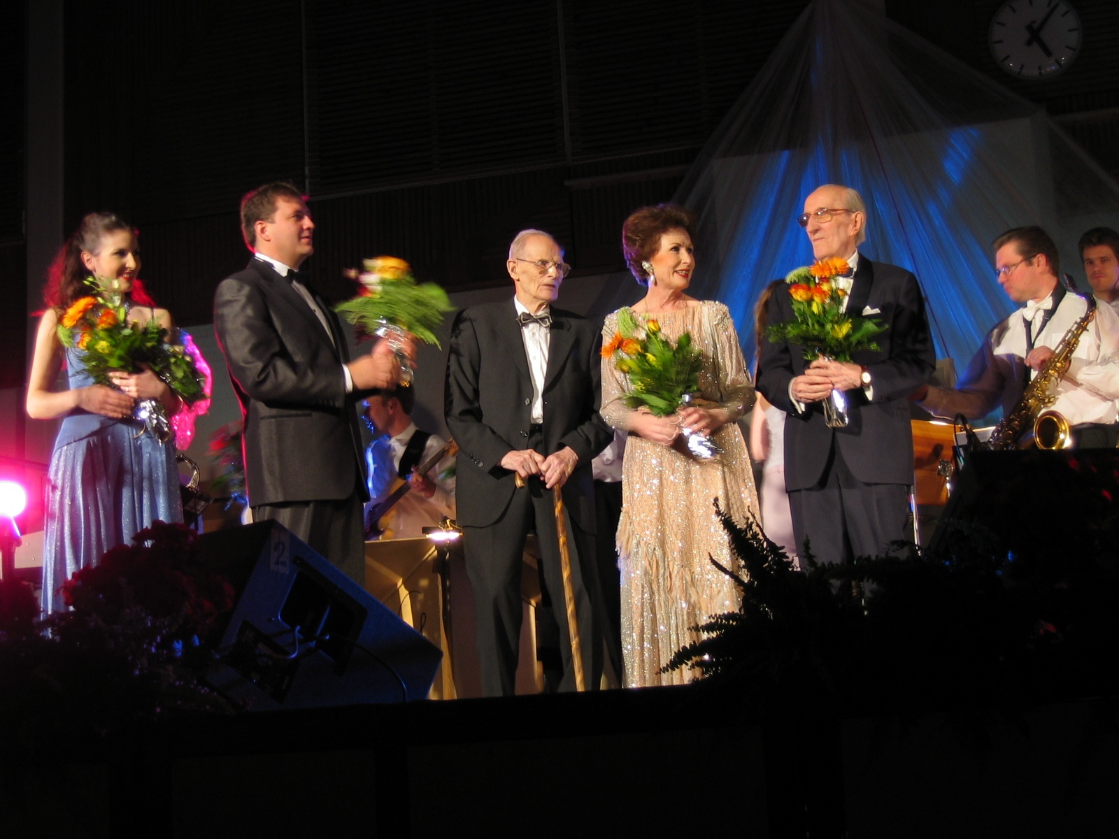 Tamara Lund, Erik Lindström, laulajatar/näyttelijä Maria Lund ja jazz-legenda Goony Strömmer Valkeakoskella Titi & Casagranden vieraana 17. huhtikuuta 2005.